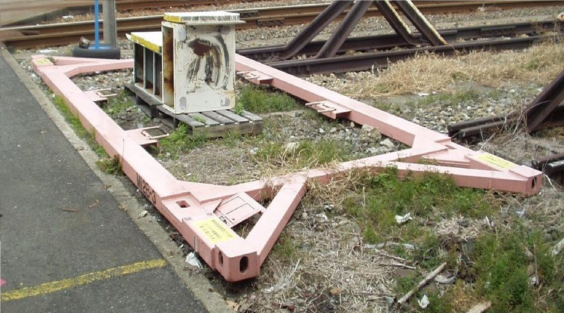 撮影地＝【大阪(タ)】